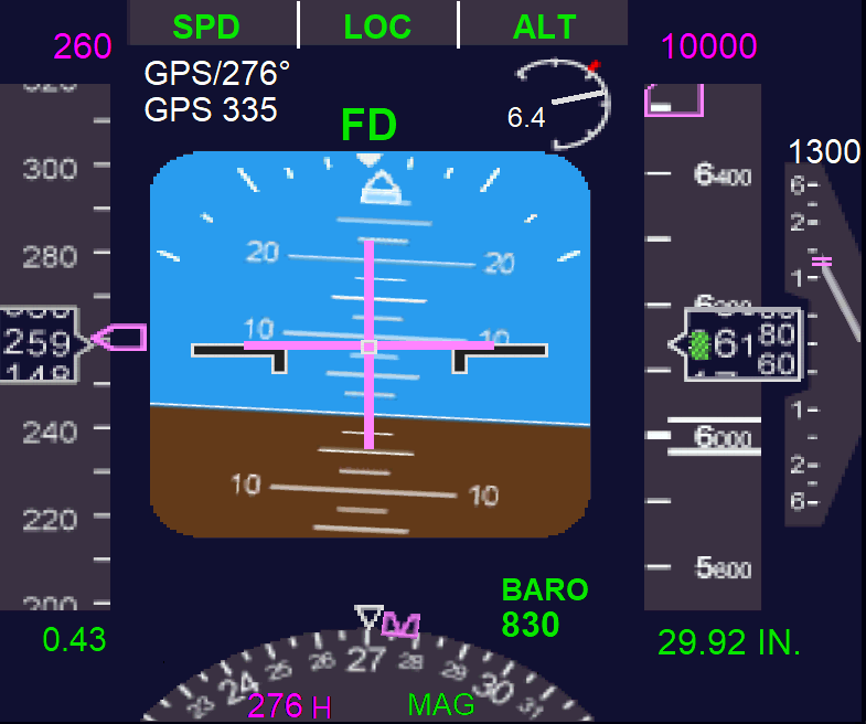 Künstlicher Horizont mit Flight Director